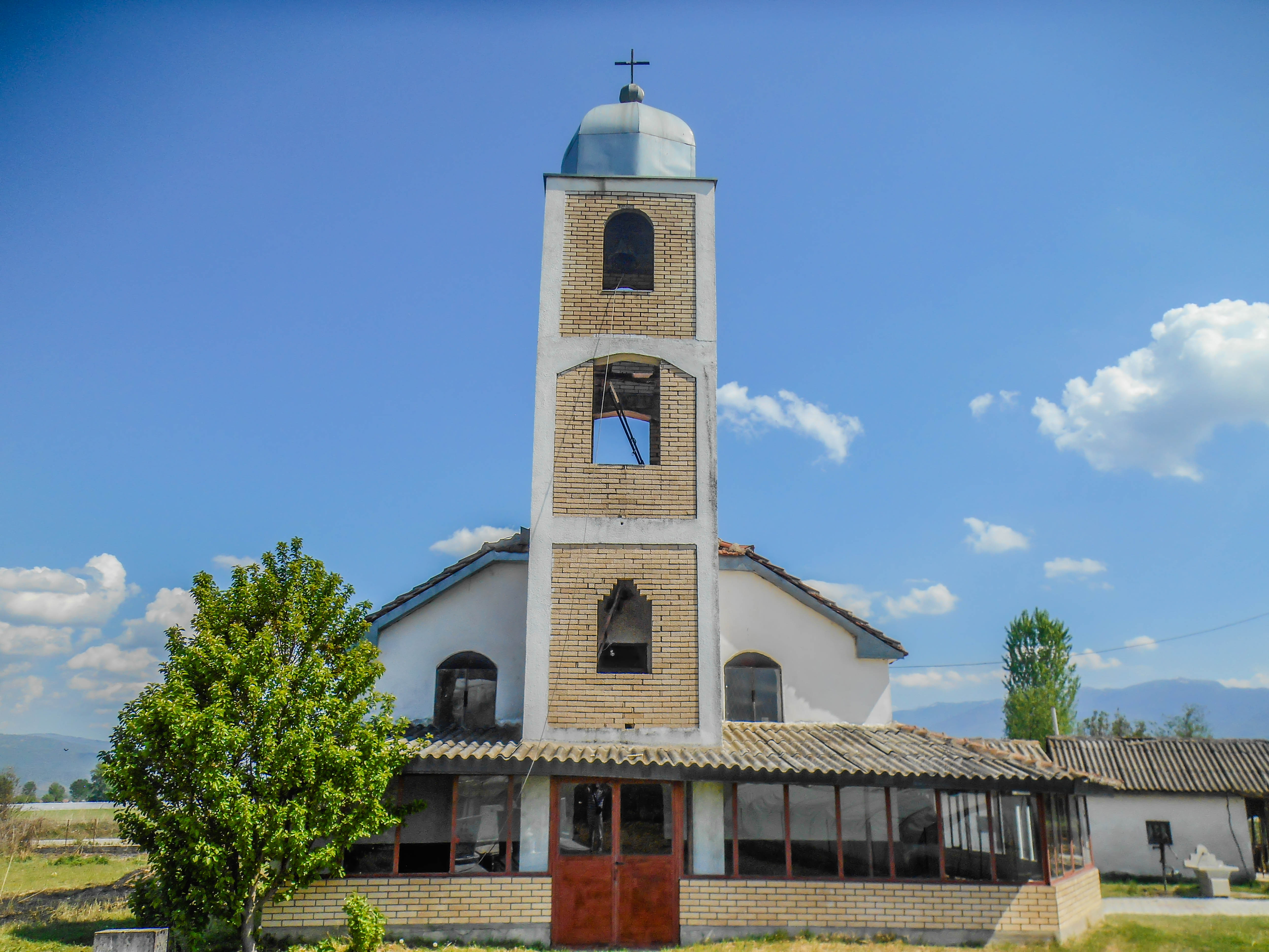 Црква „Св. Кирил и Методиј“ - Еднокуќево